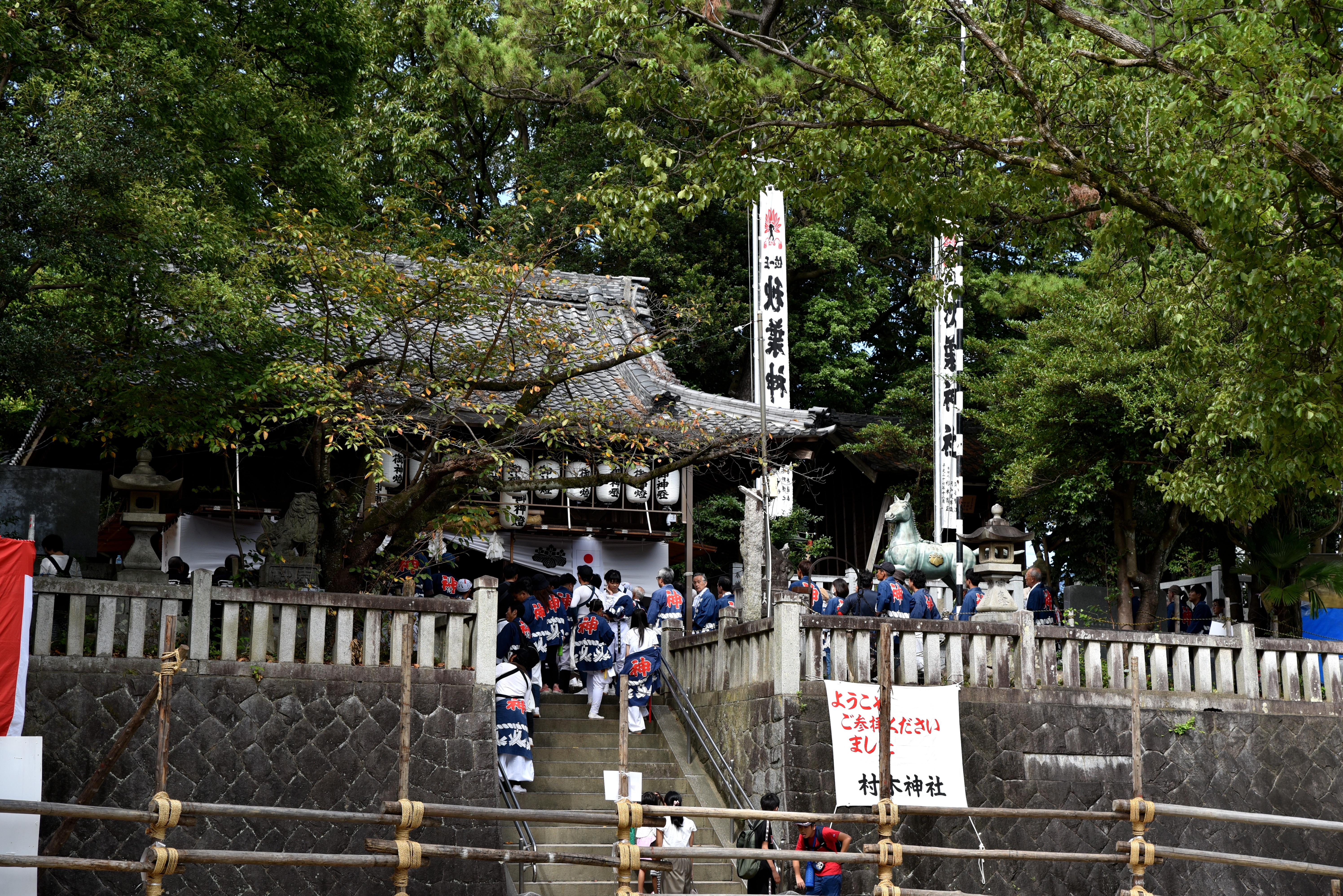 村木神社の境内